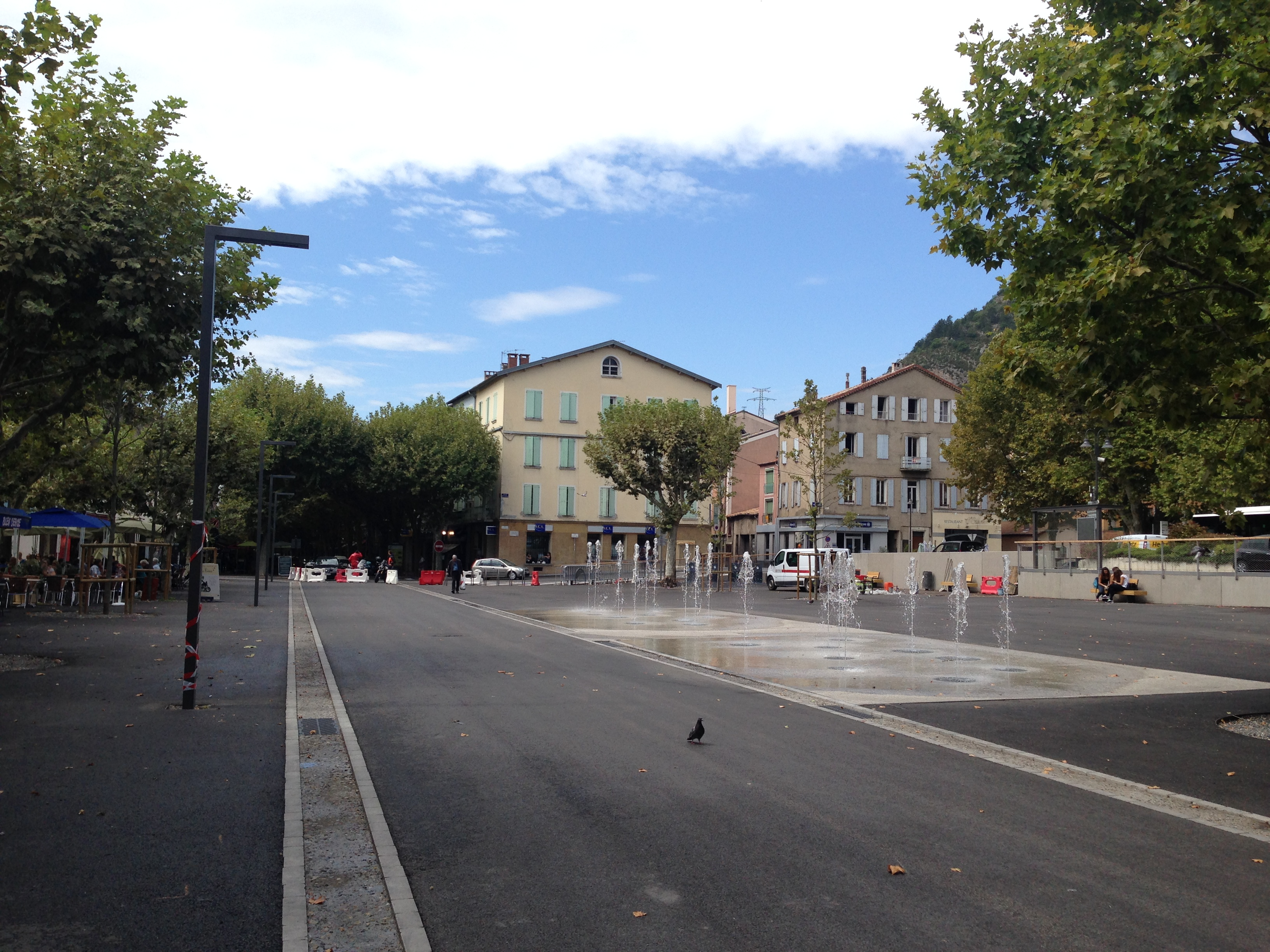 Une petite place à Digne-les-Bains